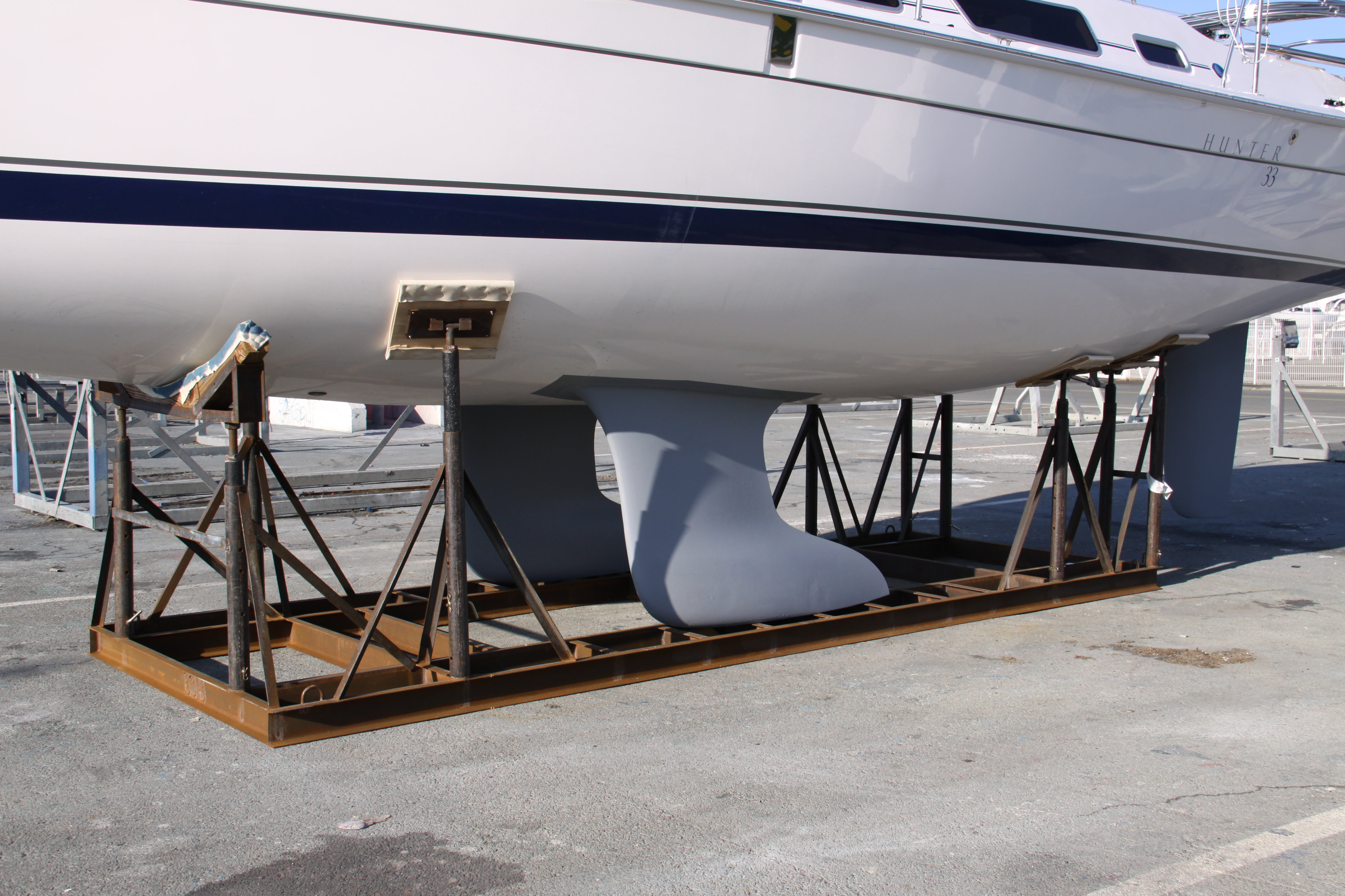 Un voilier de plaisance sur un ber statique donc le cadre a été adapté pour que les deux quilles du bateau puissent y reposer. La Rochelle (Port de Plaisance des Minimes), Charente Maritime, France.